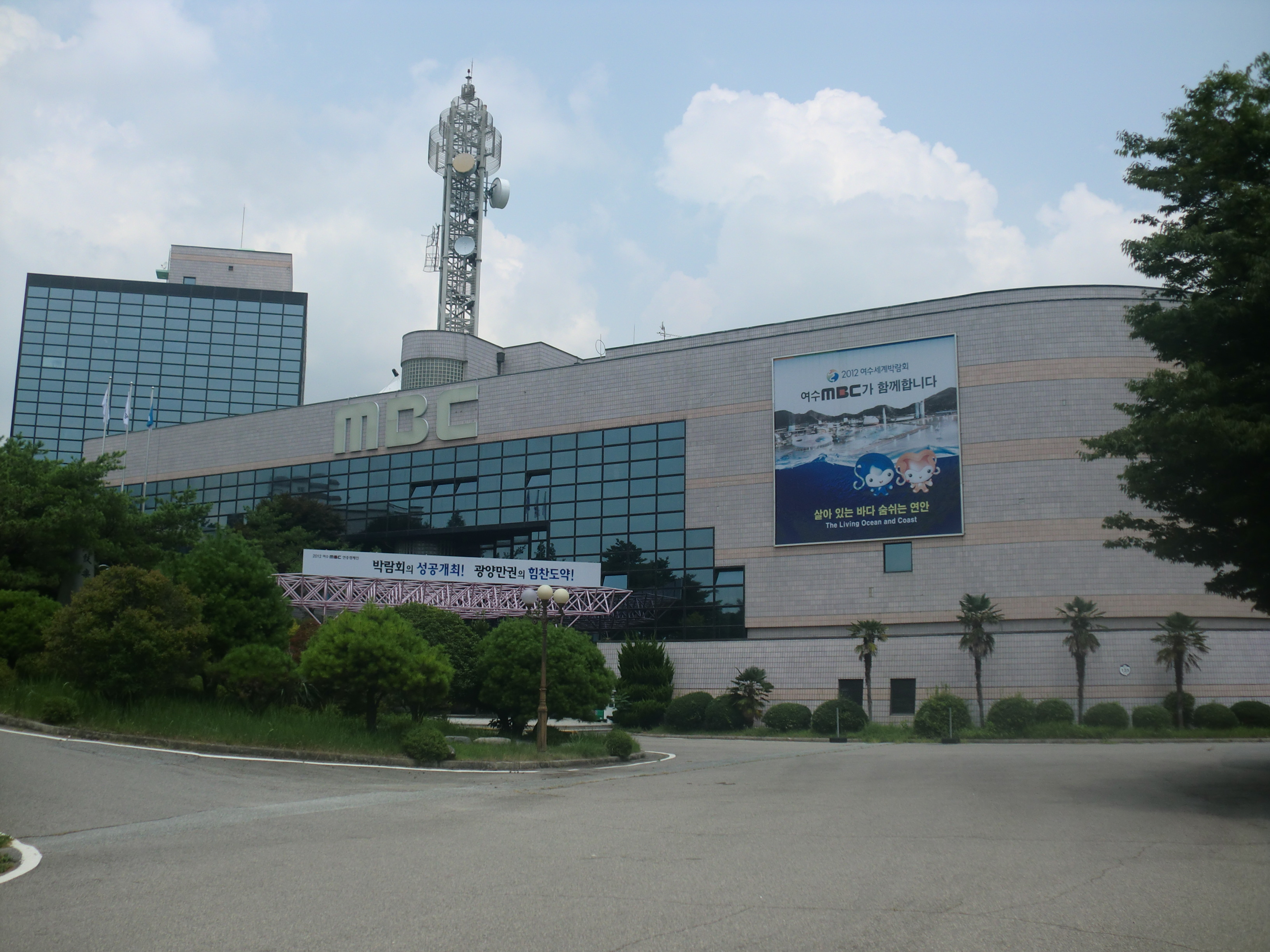 전라남도 여수시에 있는 여수문화방송